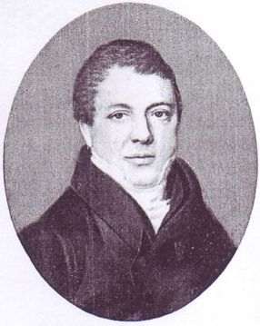 Karl Sieveking (1787-1847), hamburgischer Syndikus, im Jahre 1827